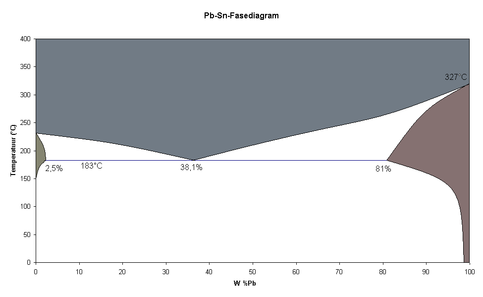 Bewerkte versie van Fasediagram_Pb_Sn.png